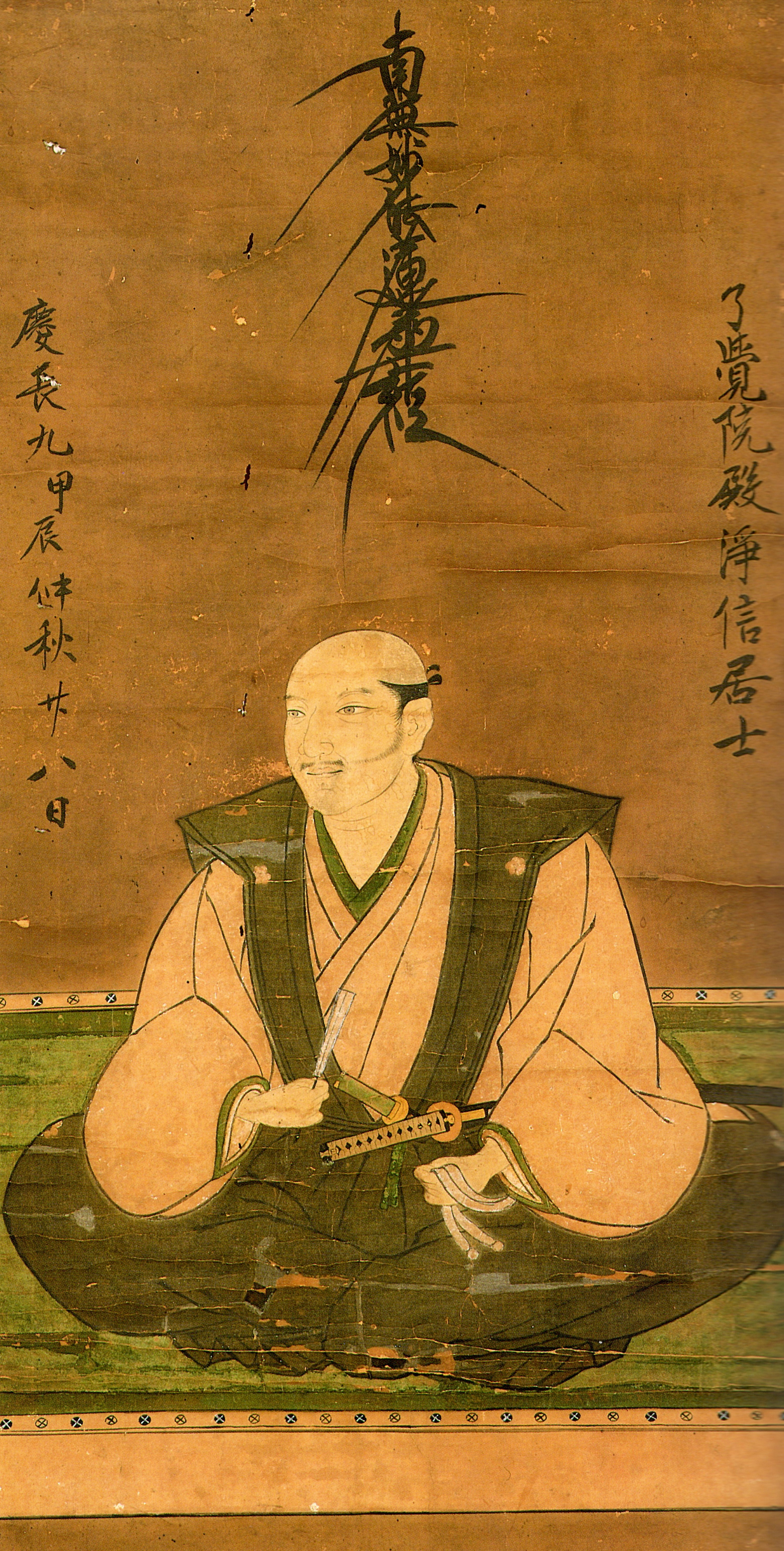 加藤可重の肖像。